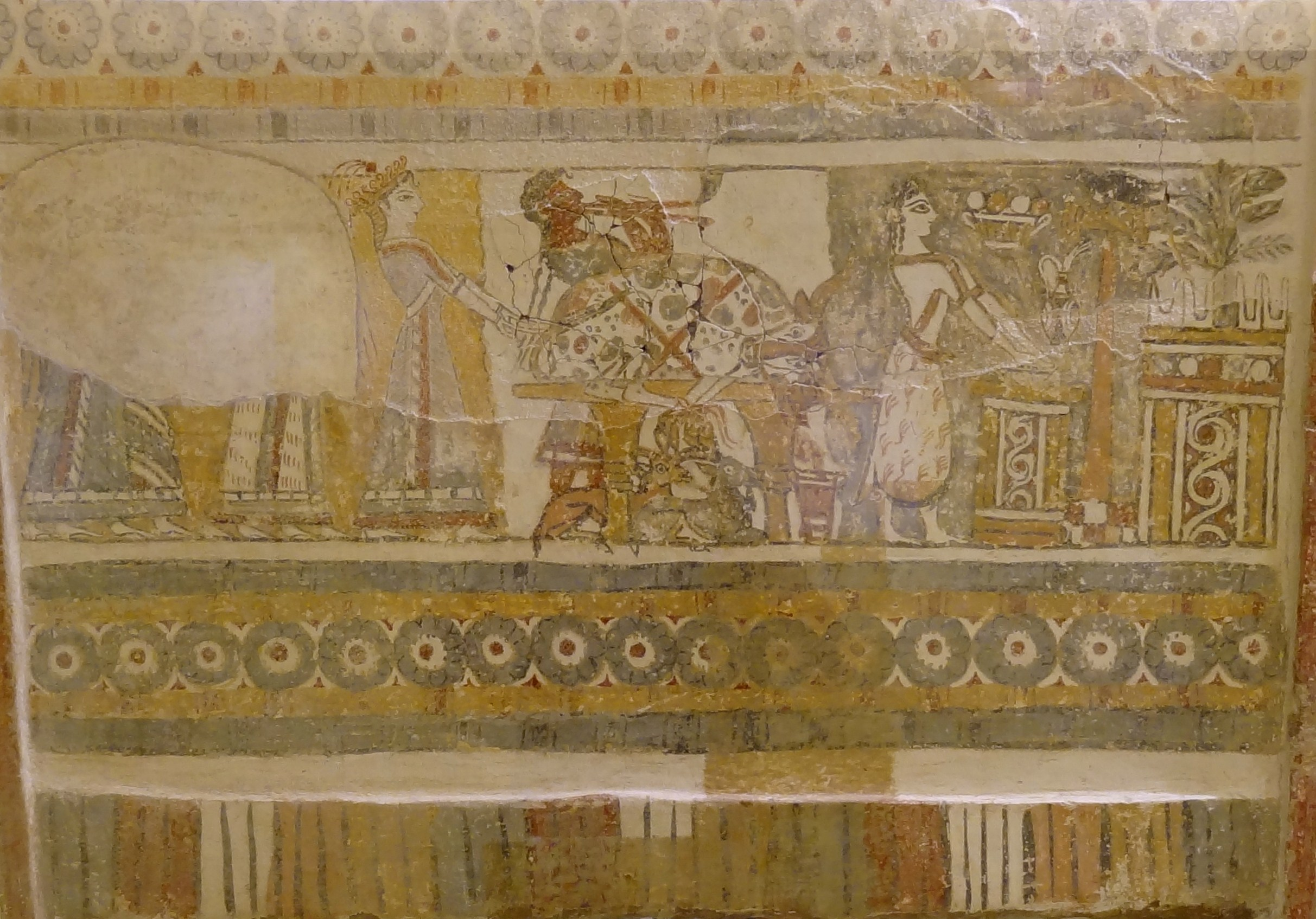 Fresko auf dem Sarkophag von Agia Triada (14. Jahrhundert v. Chr.), ausgestellt im Archäologischen Museum Iraklio, Kreta, Griechenland